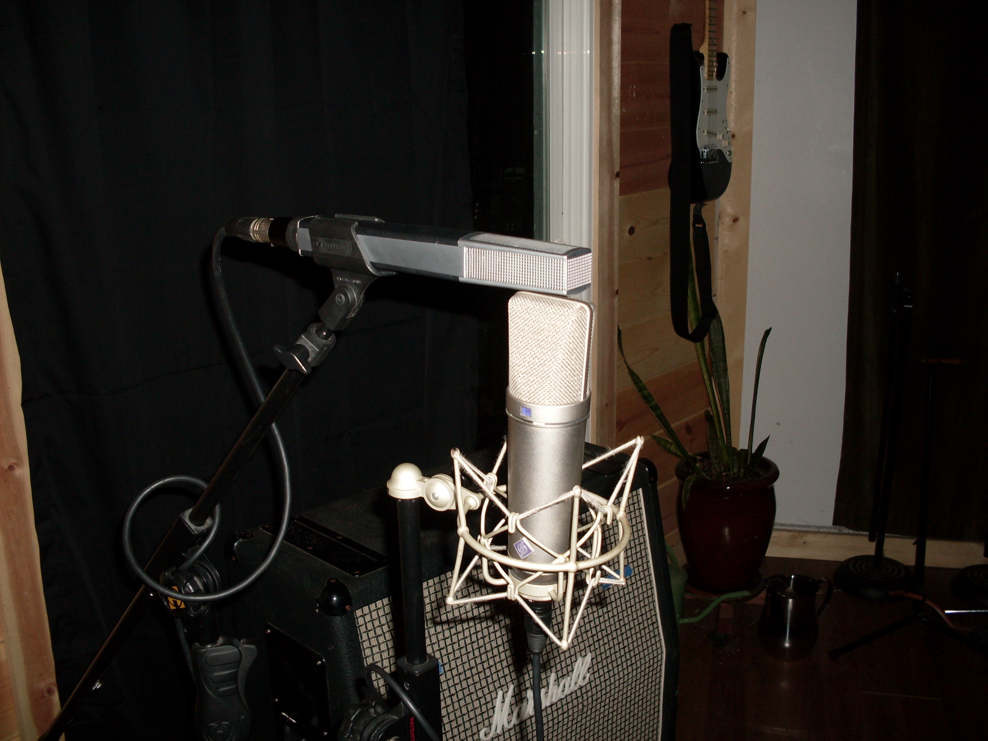 Neumann U87 and Sennhesier MD 441 together in mid/side stereo.